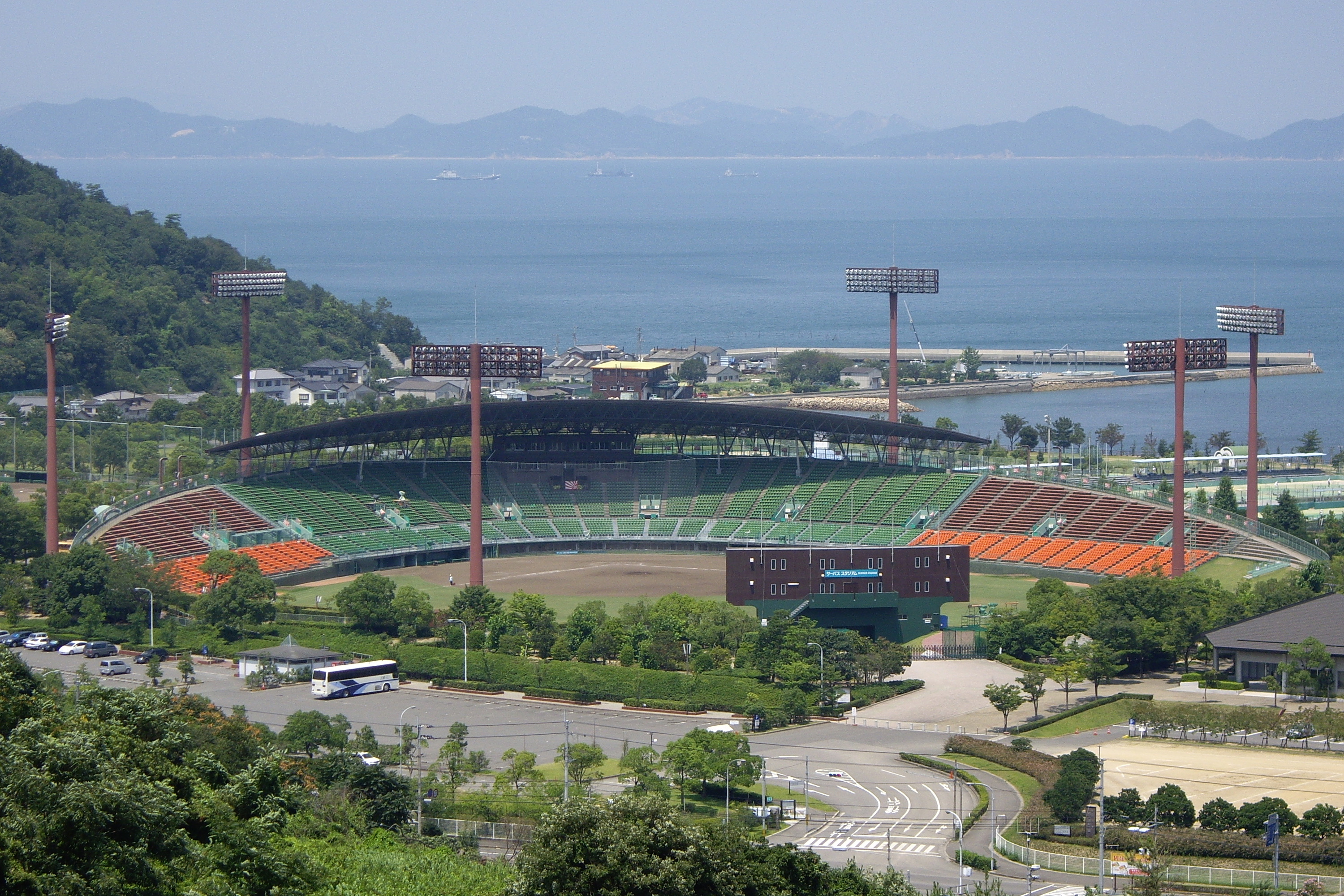 香川県営野球場（全景） - 日本国香川県高松市